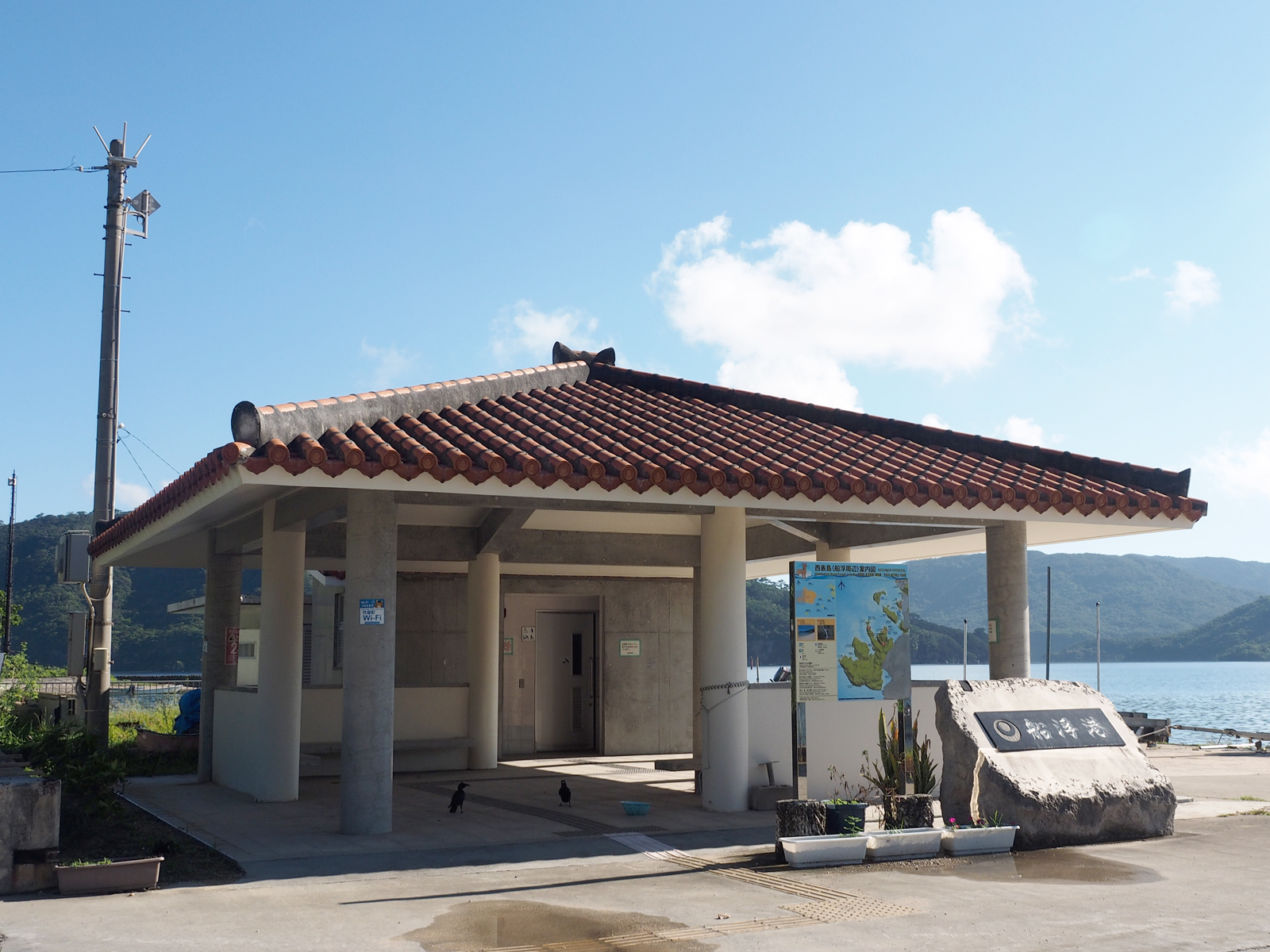 船浮港待合所（沖縄県八重山郡竹富町西表島船浮）